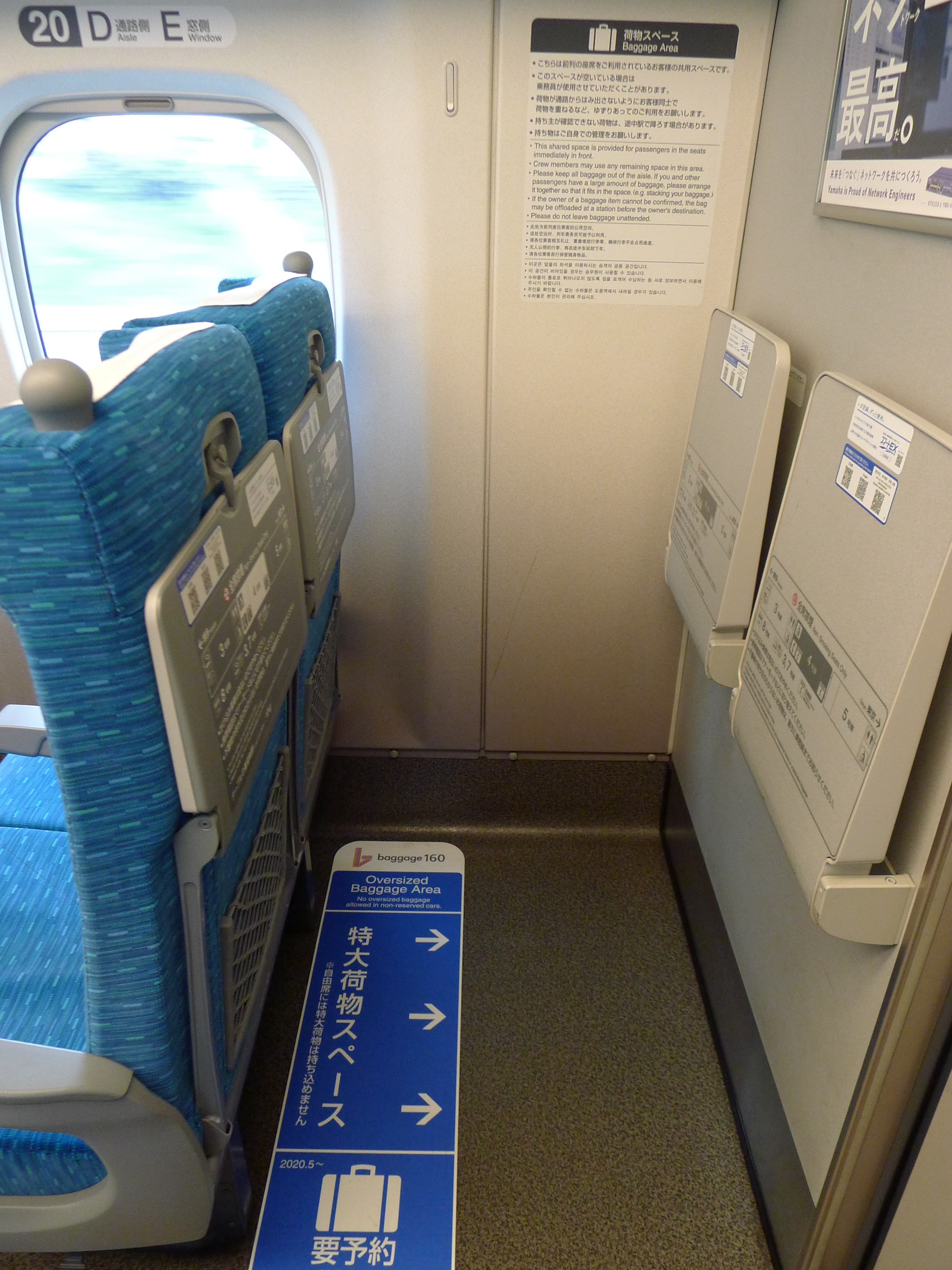 ついに業務出張が再開し、早速乗り込んだ東海道新幹線には2020年5月20日から特大サイズの荷物を事前予約で有料で置く専用スペースが設けられていた。